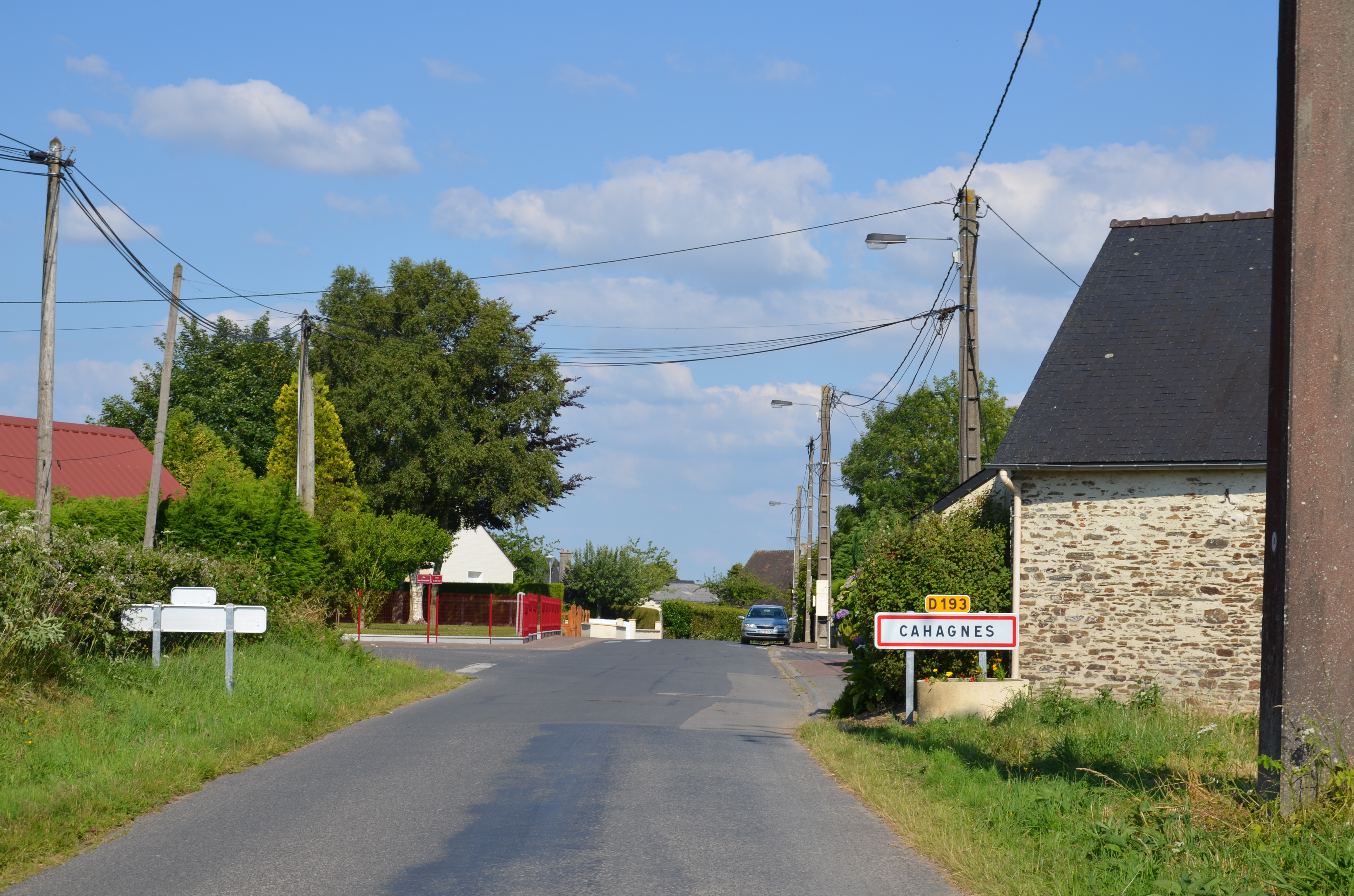 Entrée du bourg de Cahagnes par la route de Sept-Vents.